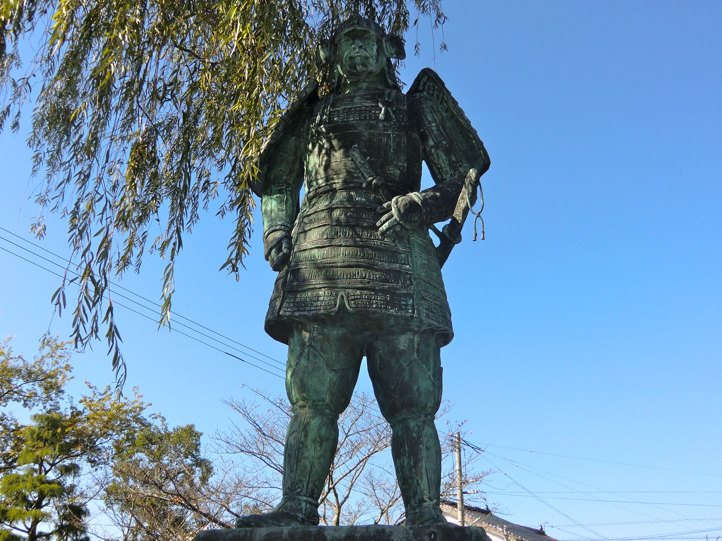 妙義寺前にある益田兼堯の彫像（島根県益田市）